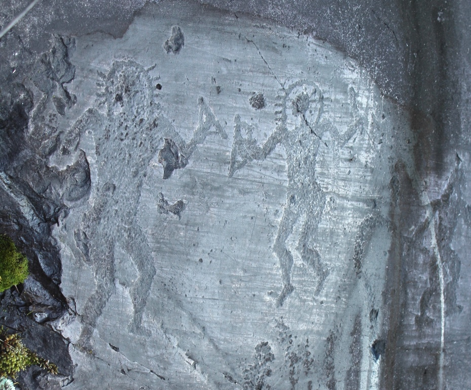 Antropomorfi detti astronauti - R 1 - Area di Zurla - Nadro